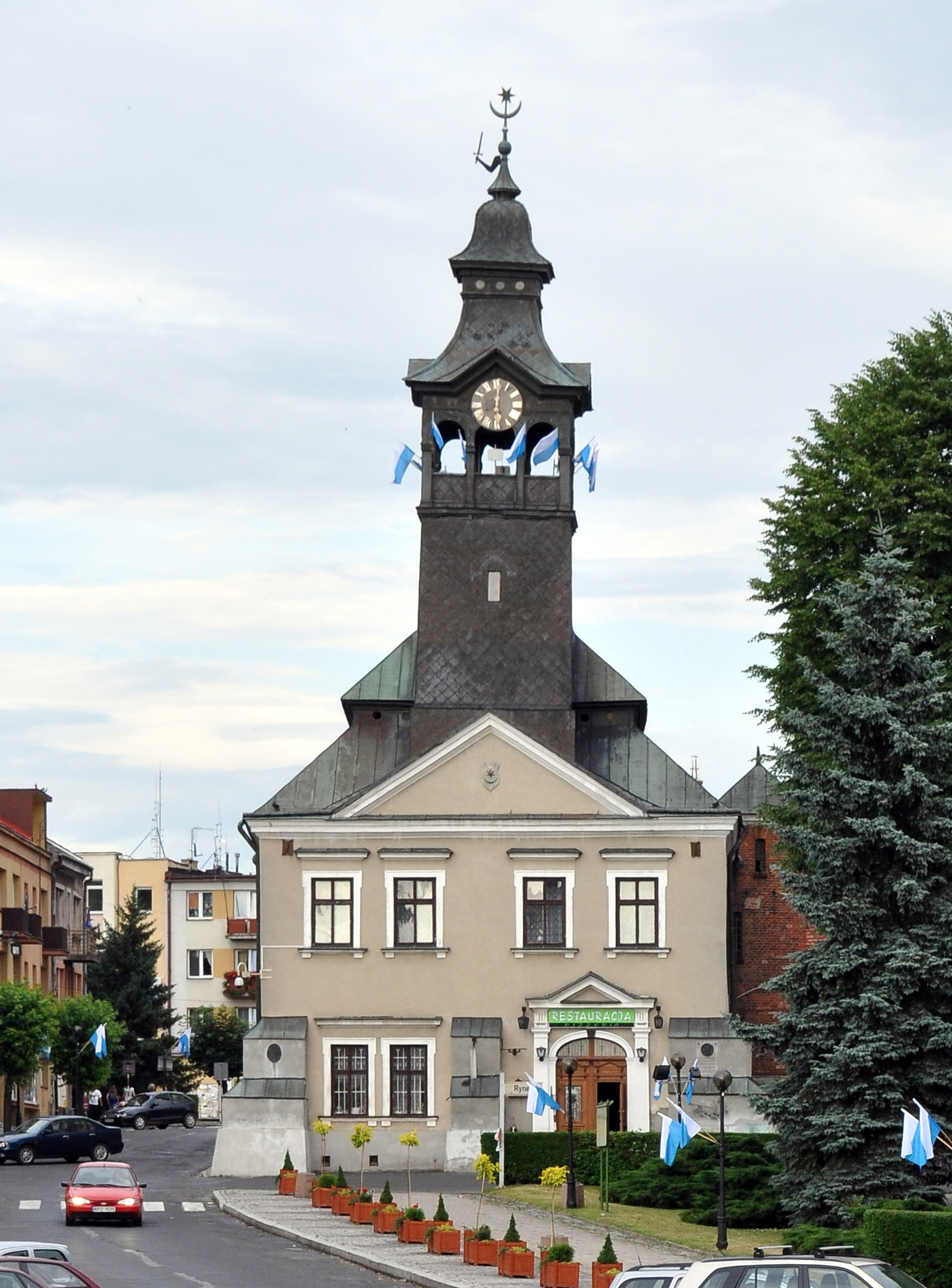 ratusz w Przeworsku (ta wieża jest naprawdę taka krzywa)